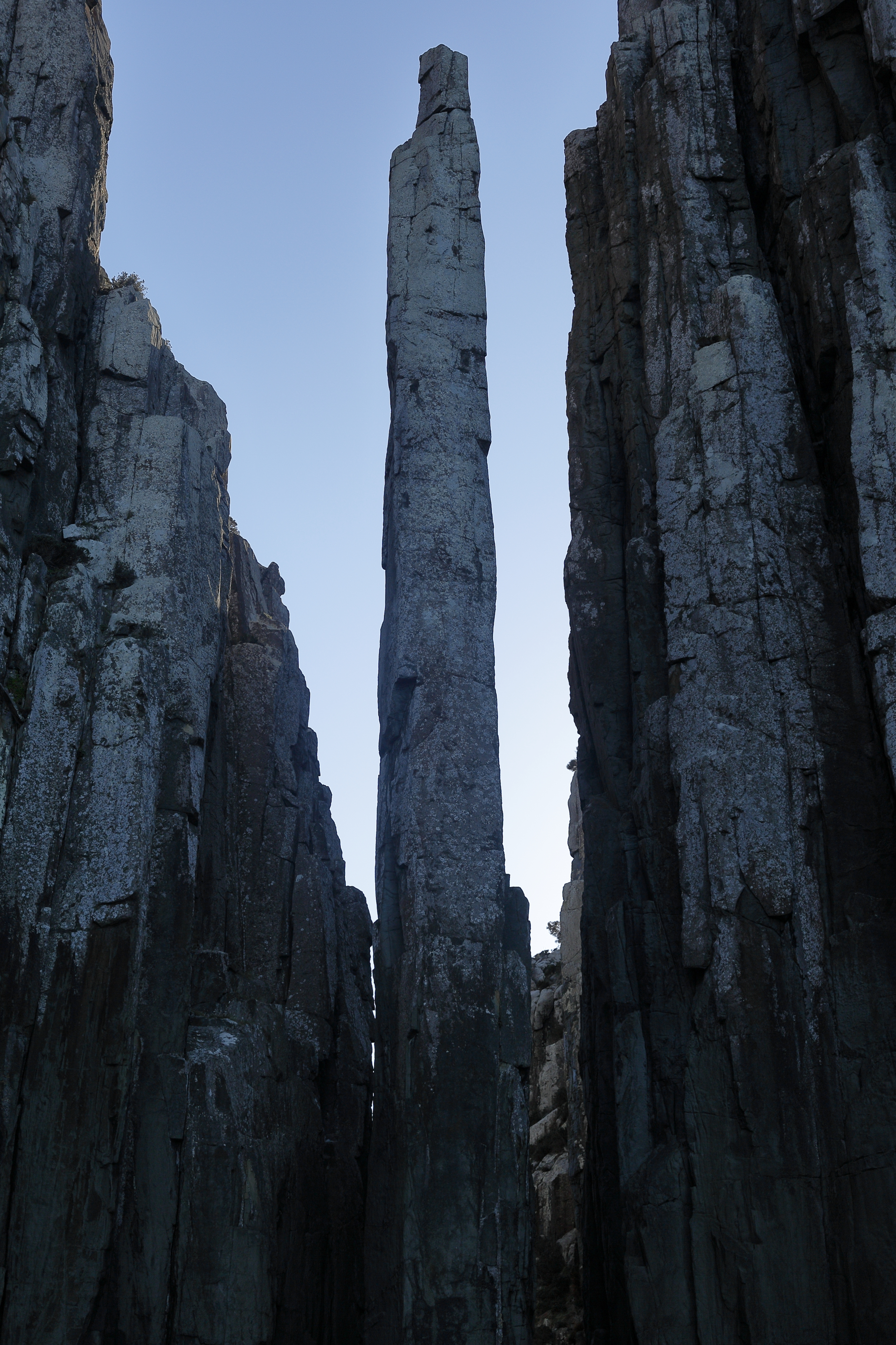 Tasman Peninsula. Tasmania.